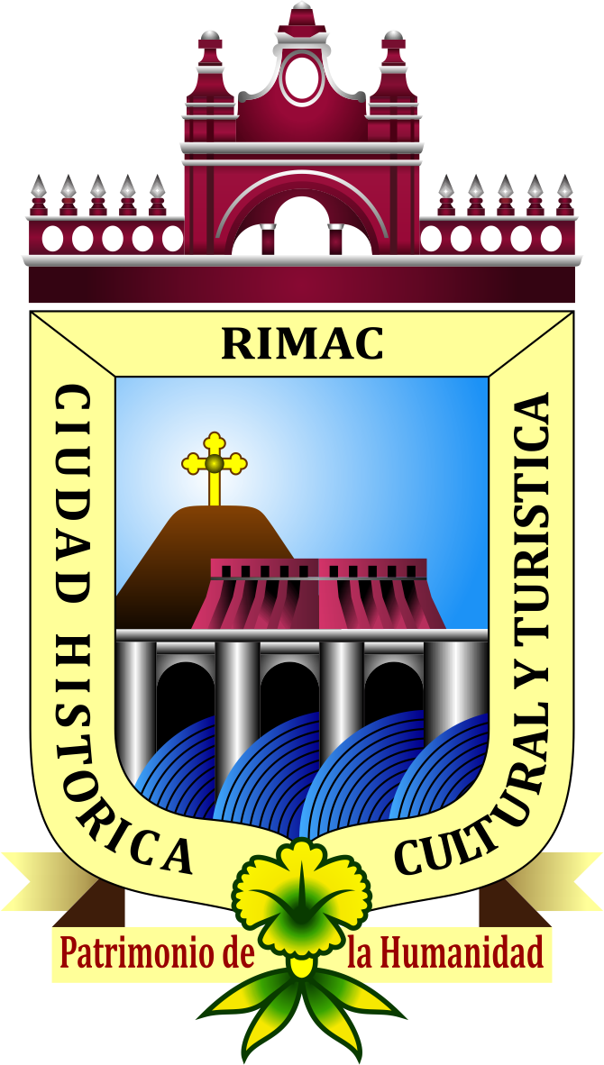 Distrito Del Rímac - Provincia de Lima - Región Lima